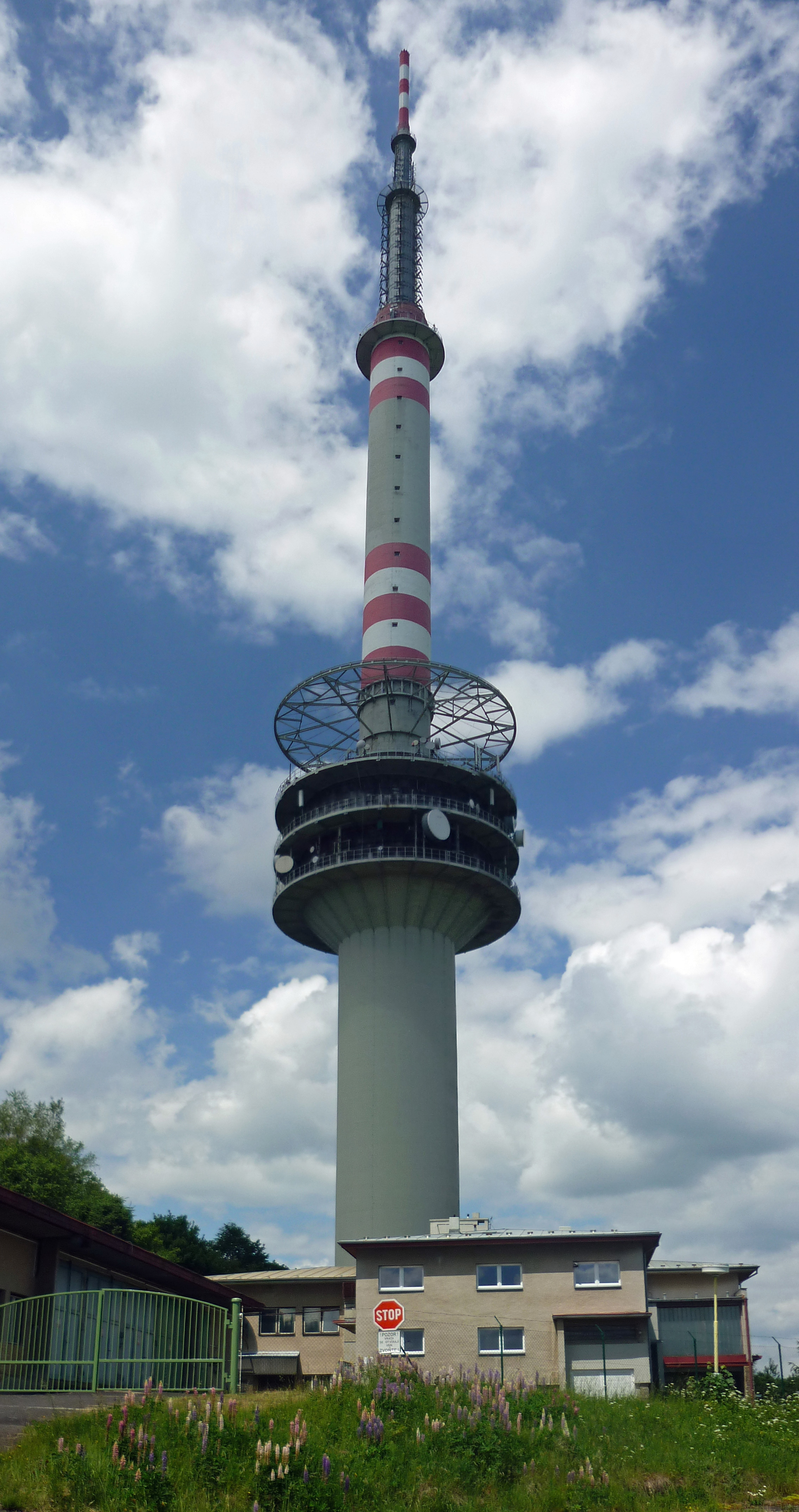 Der TV-Turm auf dem Zinkenstein (Buková hora) im Böhmischen Mittelgebirge